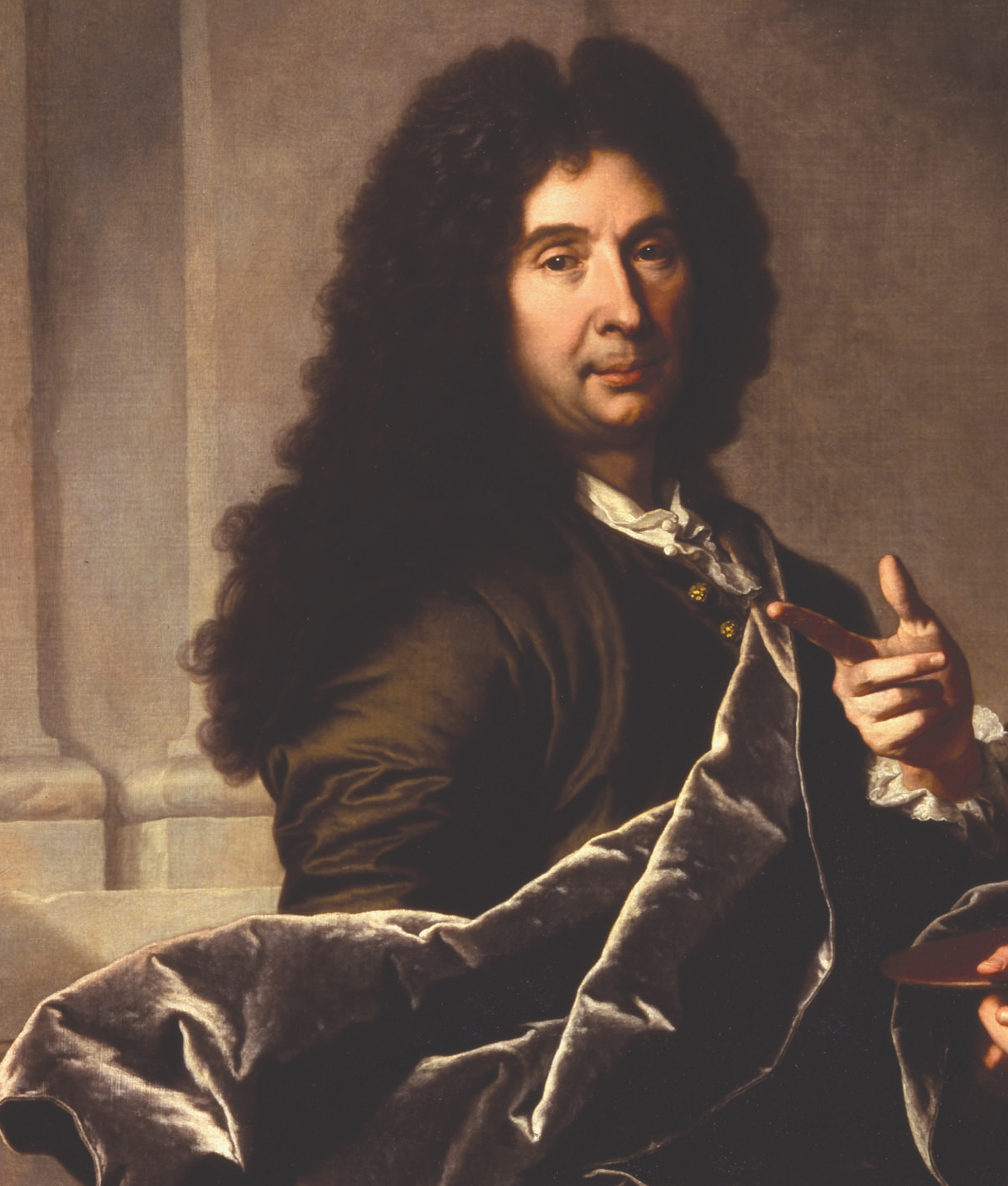 Portrait of Charles Le Brun (1619-1690) '(cropped)